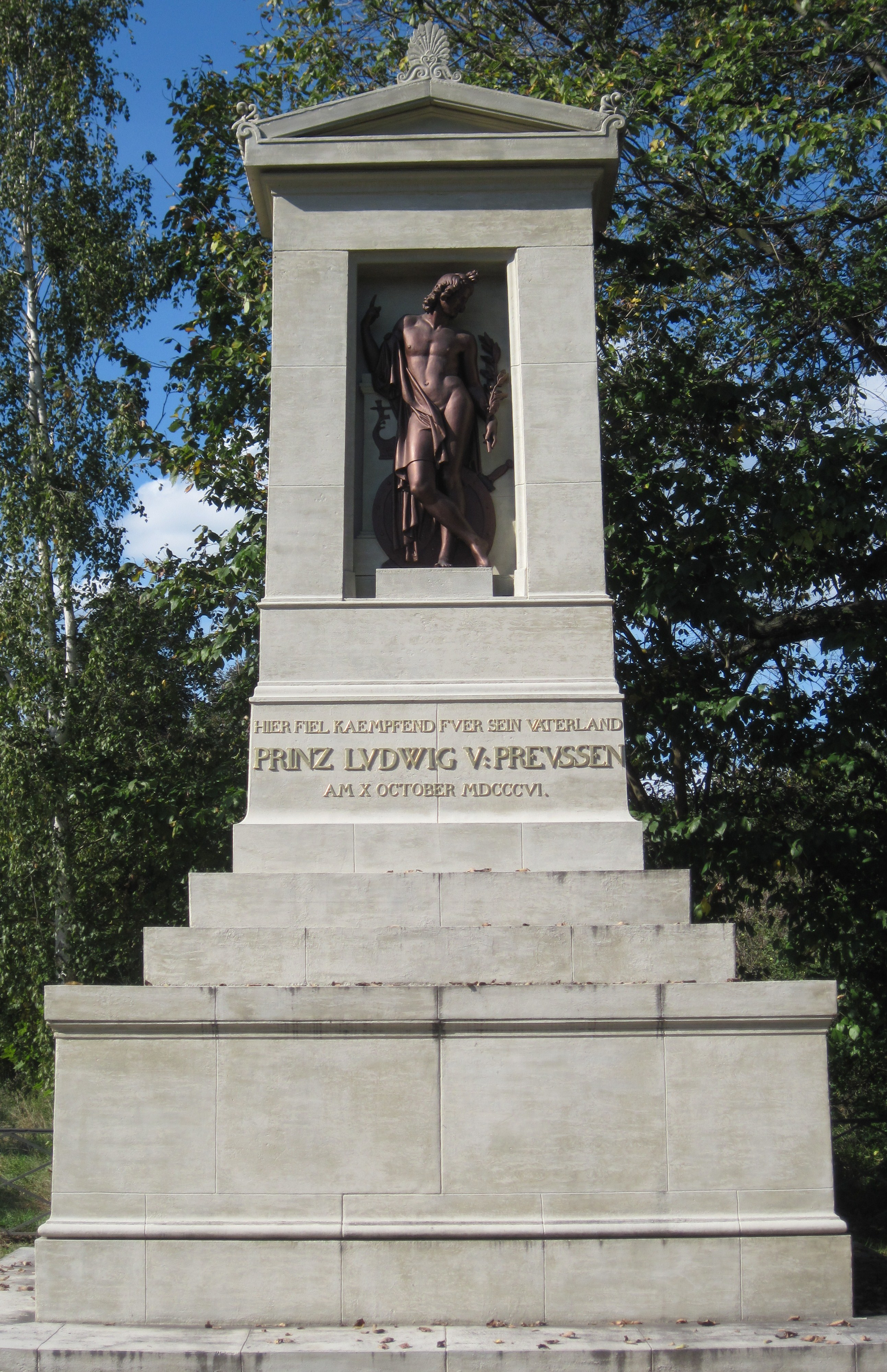 Denkmal für Prinz Louis Ferdinand von Preußen in Wöhlsdorf bei Saalfeld